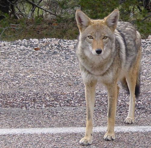 Canis latrans